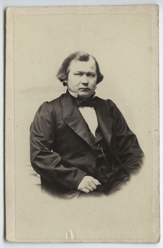 Portree: Woldemar Friedrich Kentmann, Kuusalu Laurentsiuse koguduse pastor 1863–1901